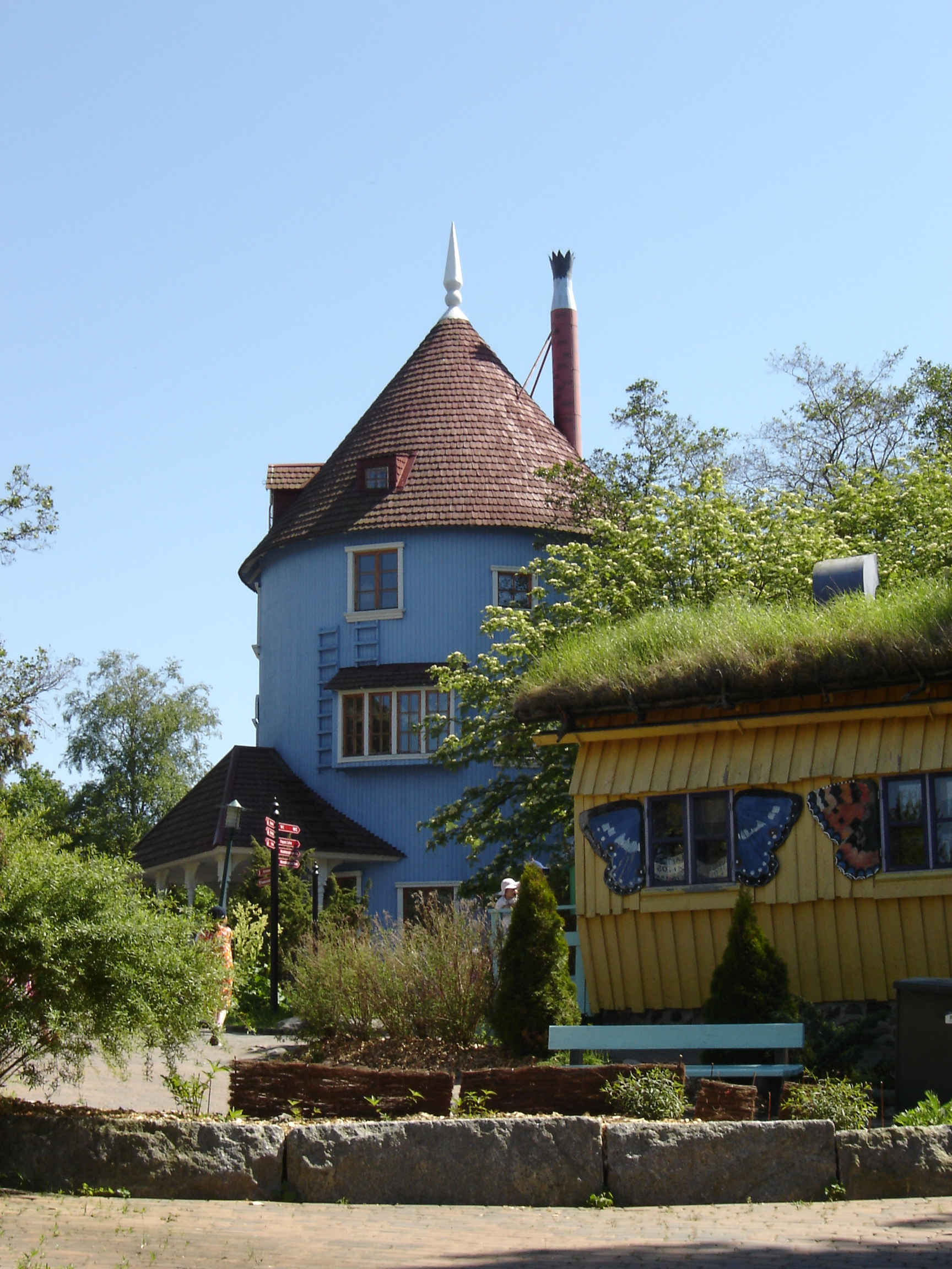 Muumitalo (taustalla, sininen) ja Hemulin talo (keltainen, oikealla) Naantalin Muumimailmassa